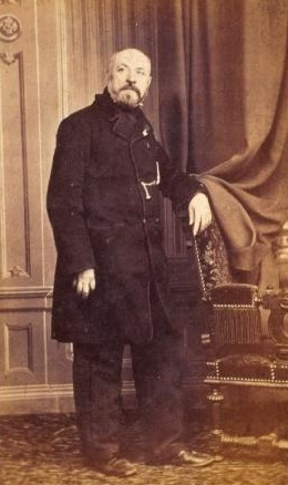 Salvador Costanzo, fotografía de J. Laurent. Museo de Historia de Madrid